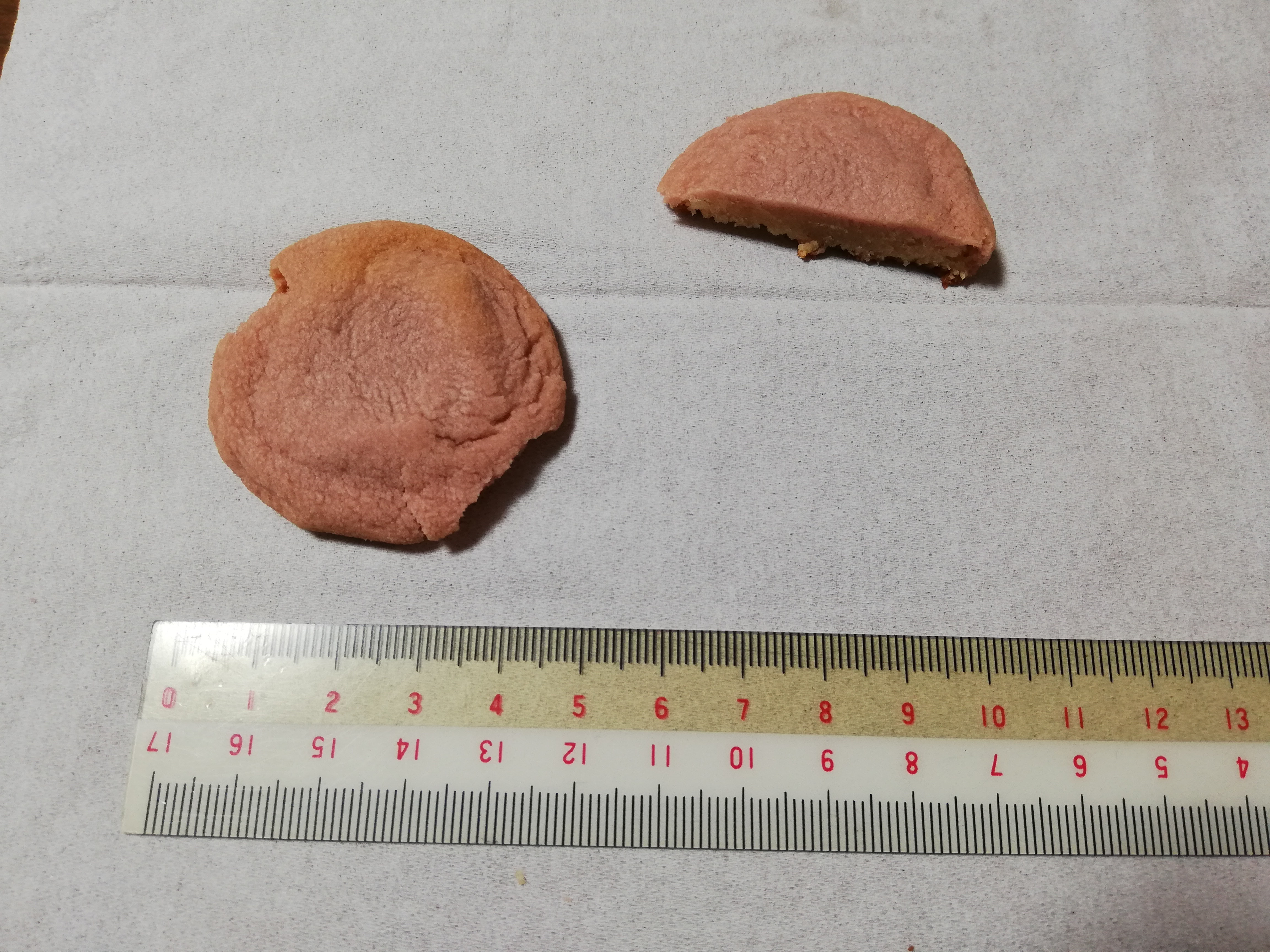 カントリーマアム、信州限定品の信州巨峰味。